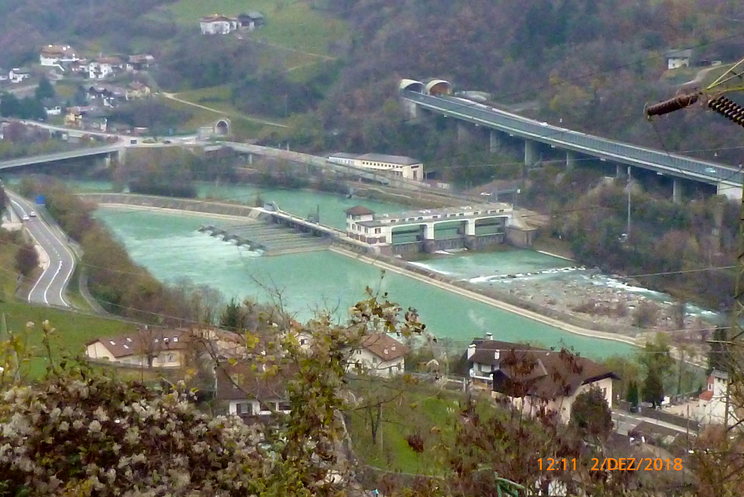 fotografiert von Kaiserweg / Via Kaiser oberhalb von Kollmann / Colma